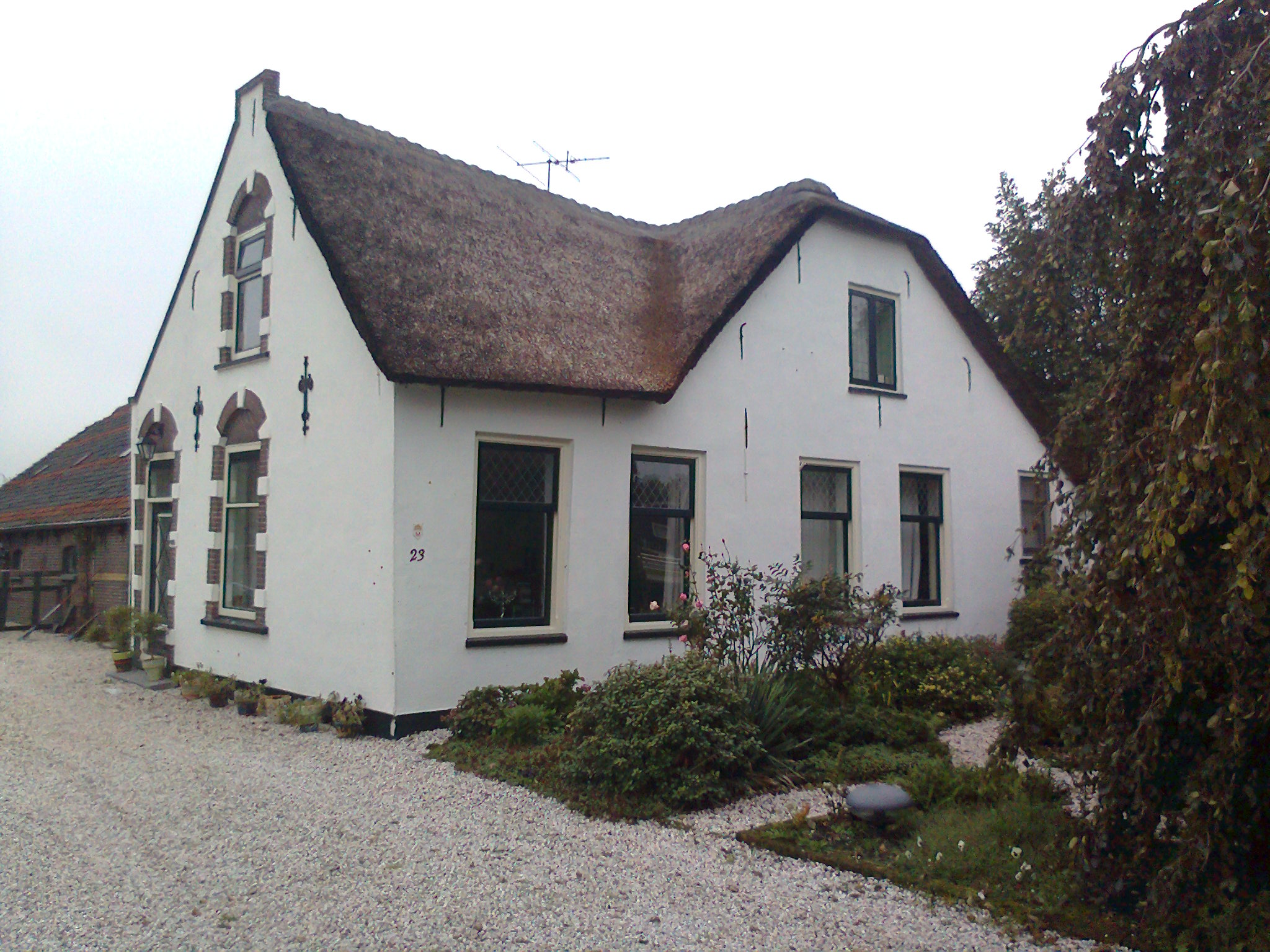 De Zomer